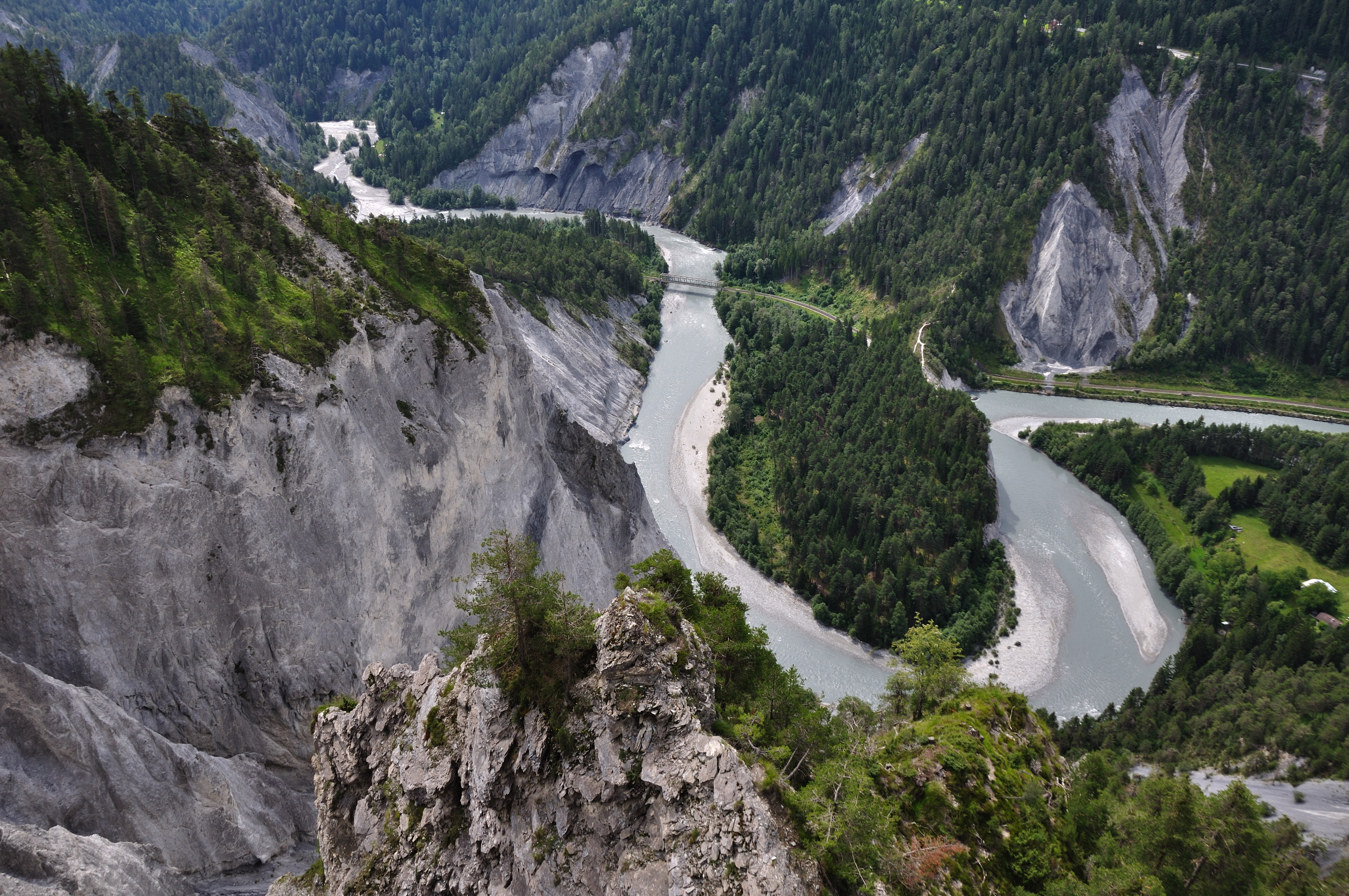 Switzerland, Graubünden, Rhine gorge (Ruinaulta) below Trin Mulin